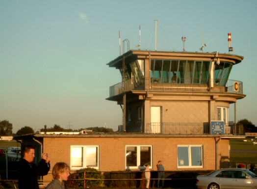 Würselen, Tower des Flughafens Merzbrück